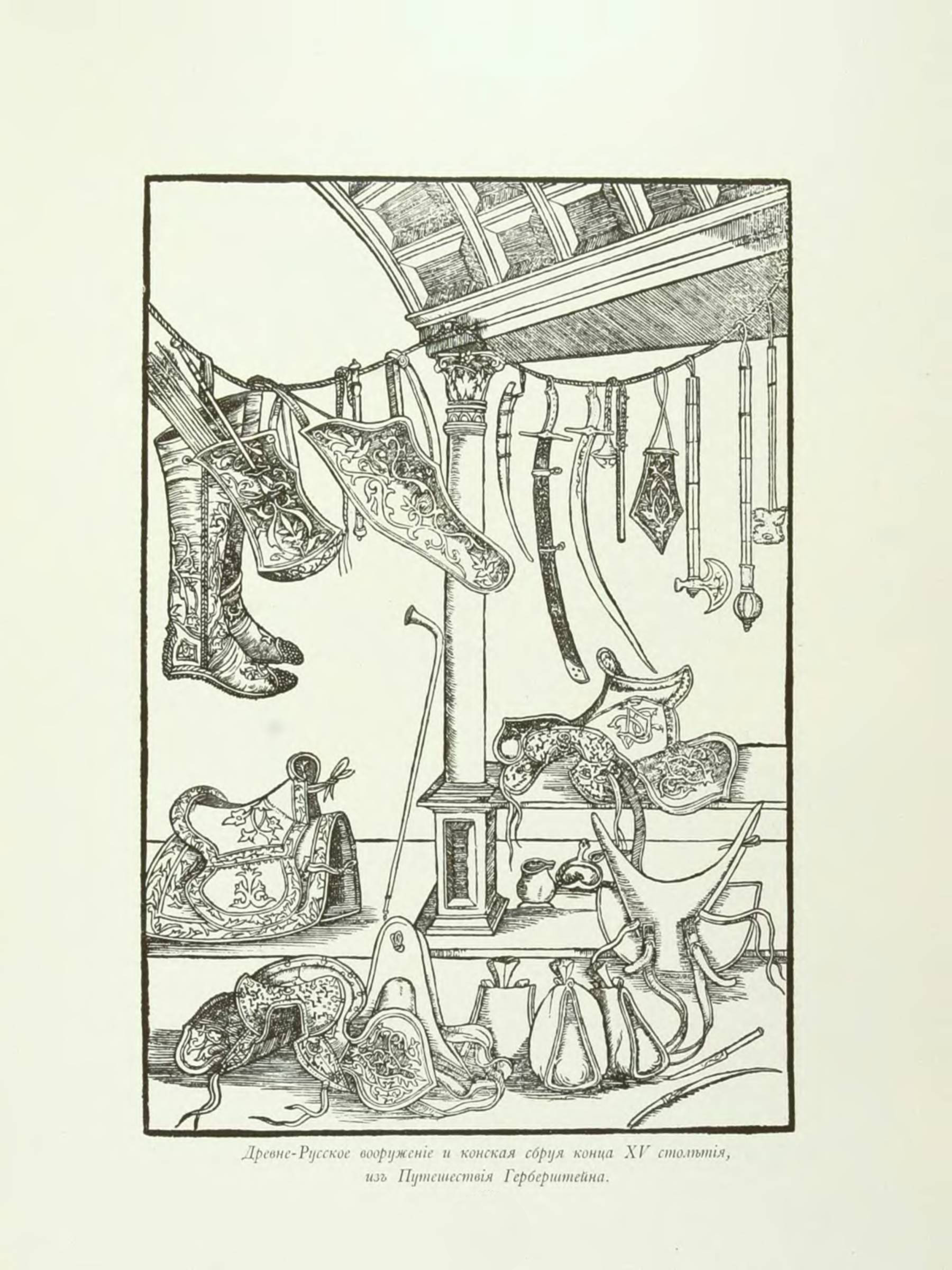 Древне-Русское вооружение и конская сбруя конца XV столетия из Путешествия Герберштейна. Великокняжеская, царская и императорская охота на Руси.